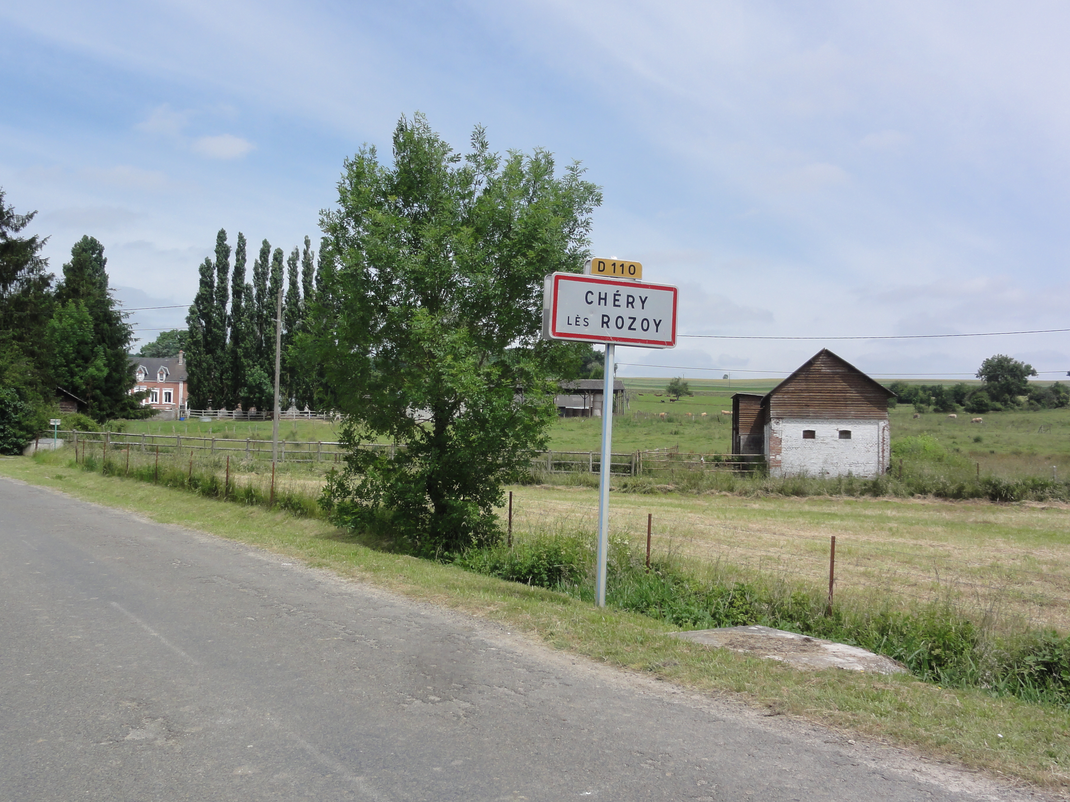 Chéry-lès-Rozoy (Aisne) city limit sign